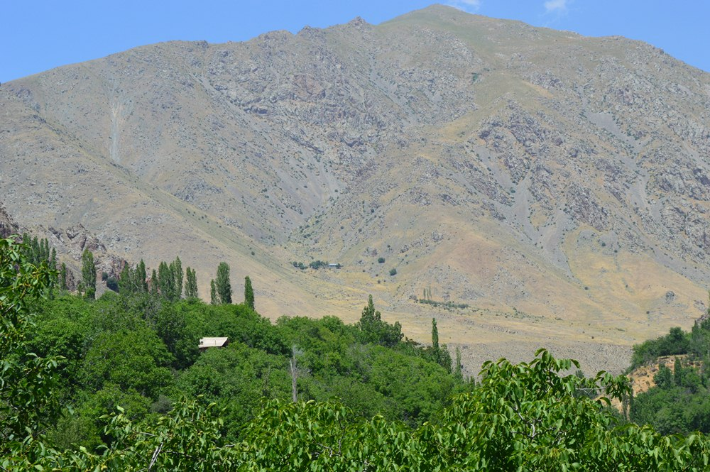 Ordubad rayonu Nüsnüs kəndi Dərə piri